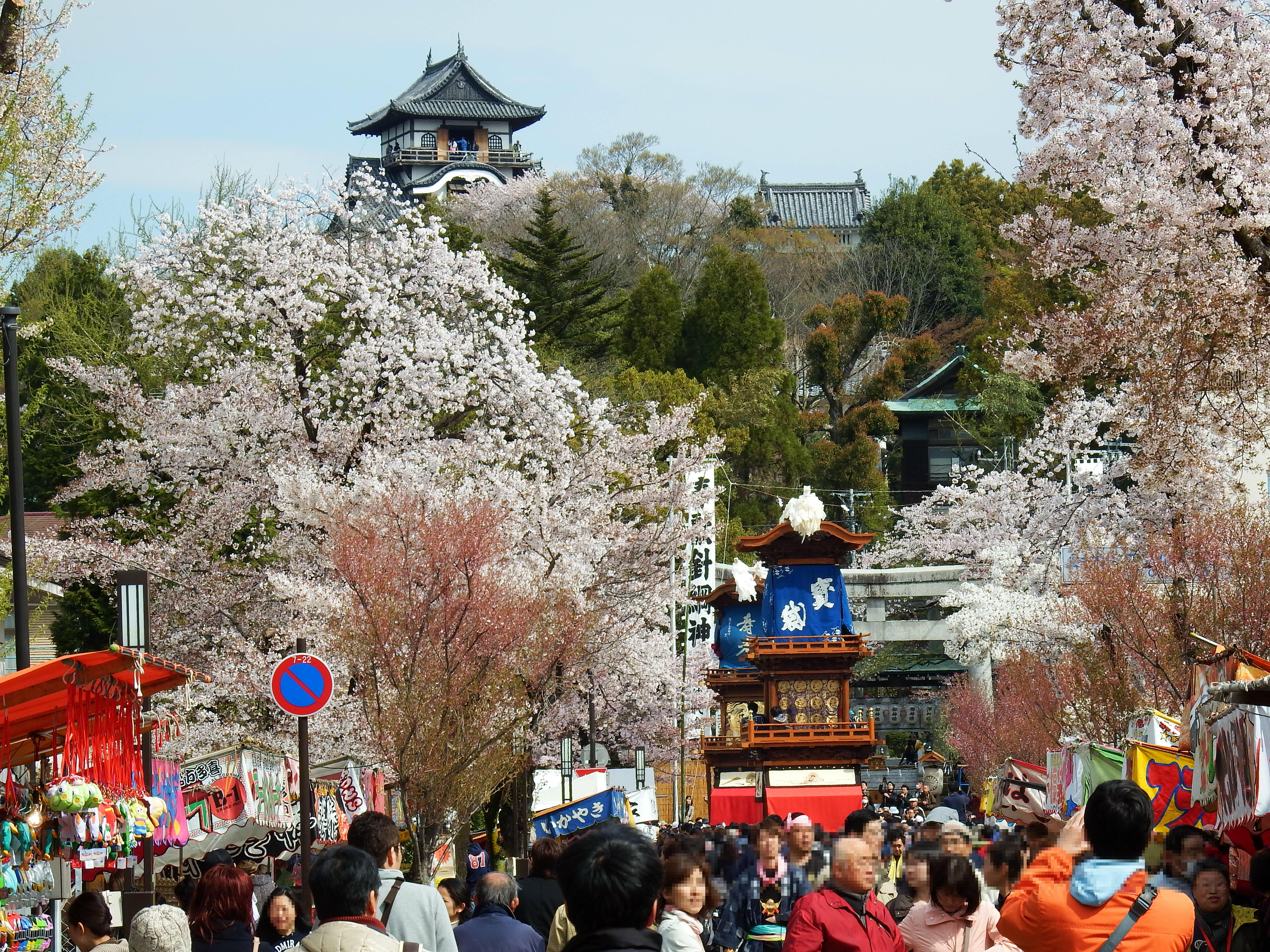 犬山城と山車